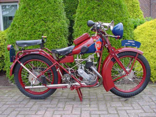 Toestemming van Yesterdays Antique Motorcycles (